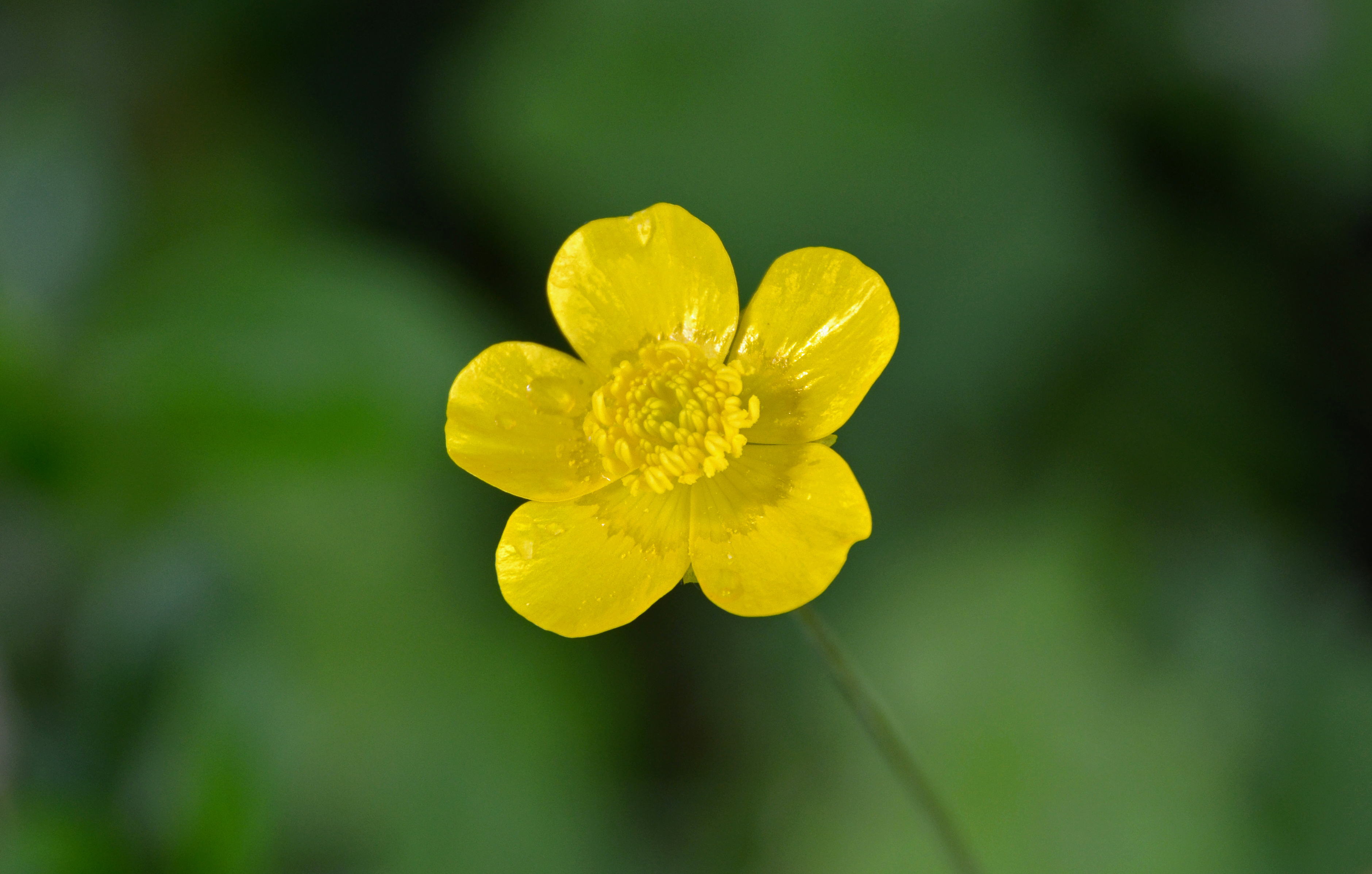 Renoncule rampante (Ranunculus repens) ou bouton d'or prise au printemps.